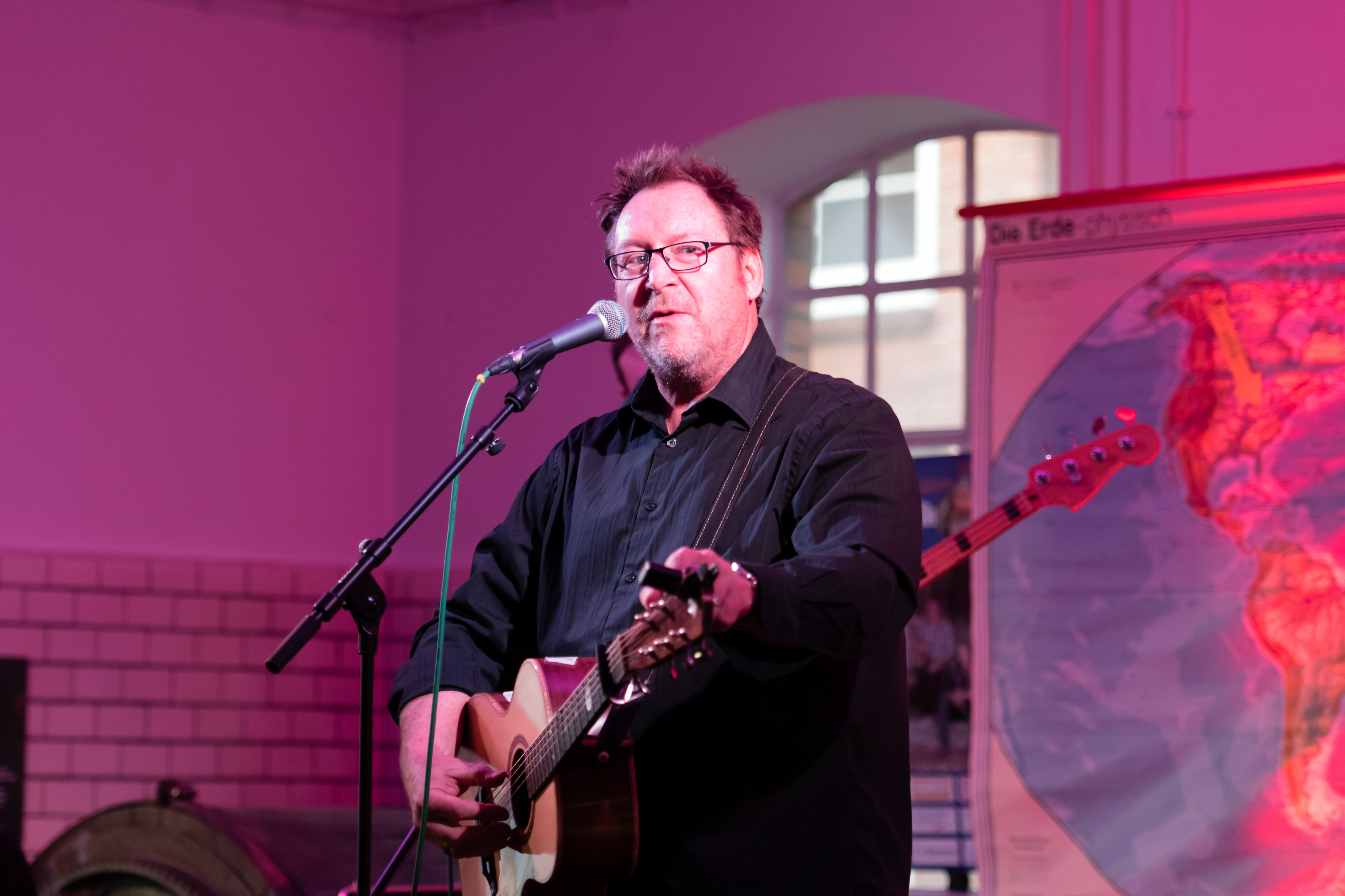 Tim Grimm and Family Band bei Lottes Musiknacht im Industriemuseum Elmshorn 2017